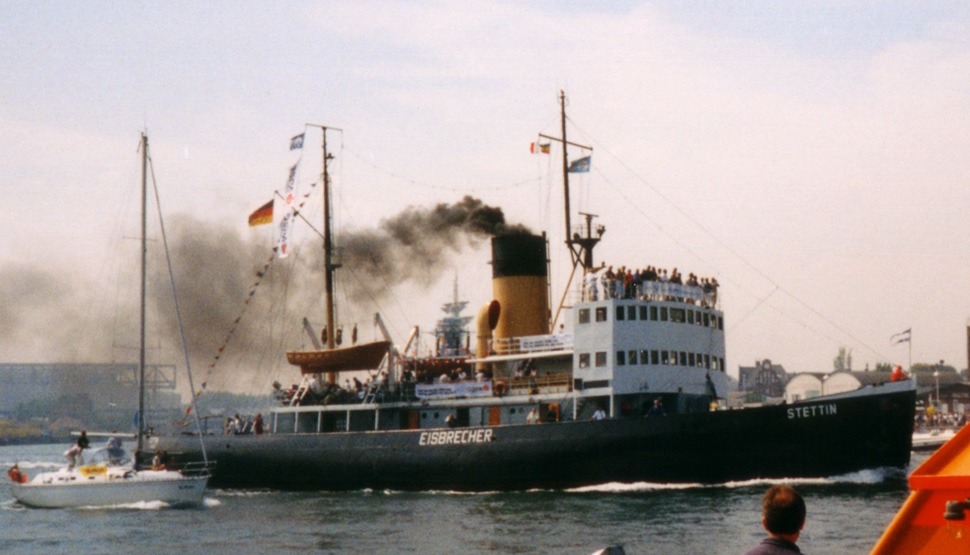 Beschreibung: Dampfeisbrecher Stettin in Warnemünde / Hansesail 1999